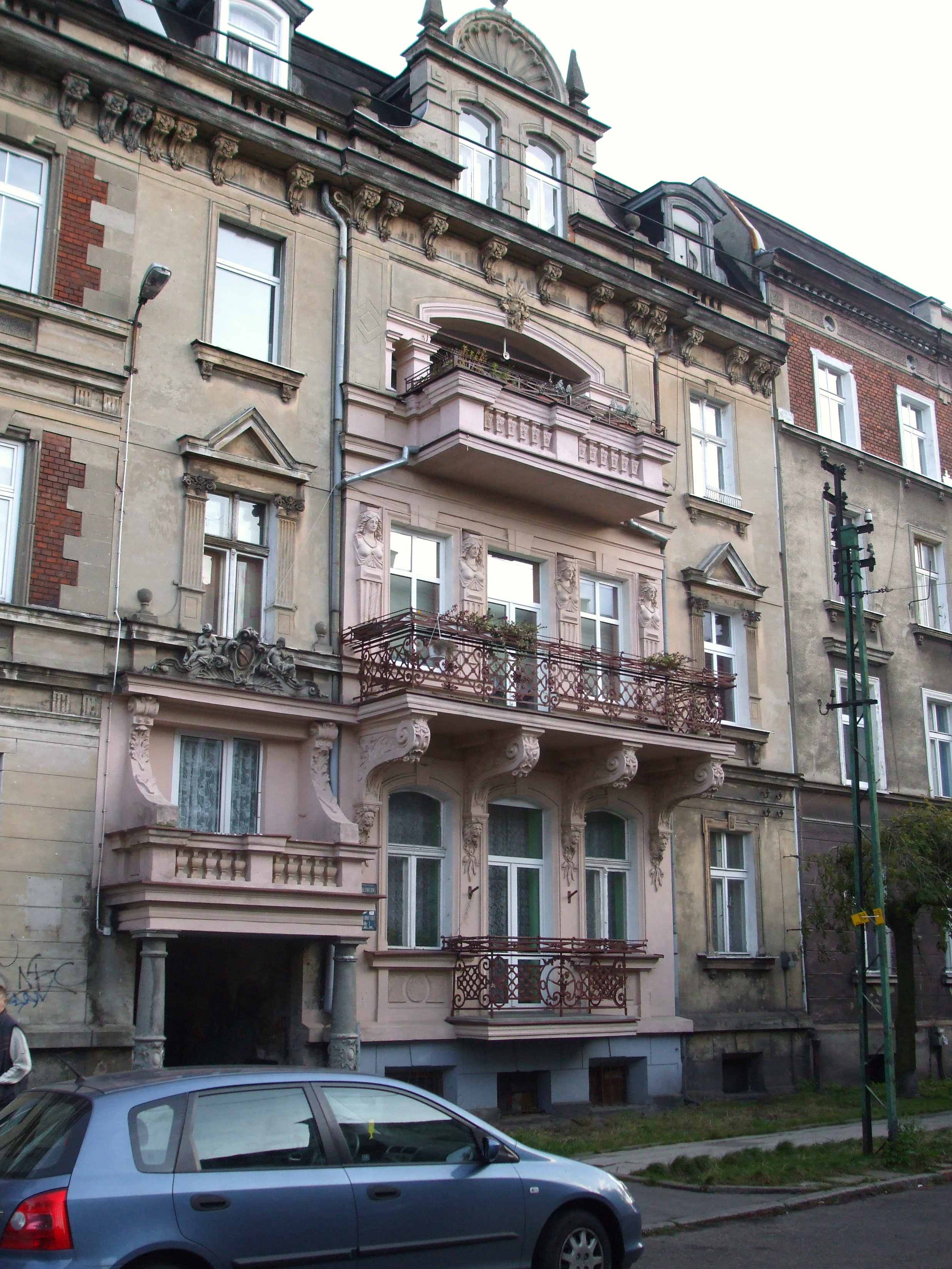 Gdańsk Nowy Port, ul. Rybołowców.